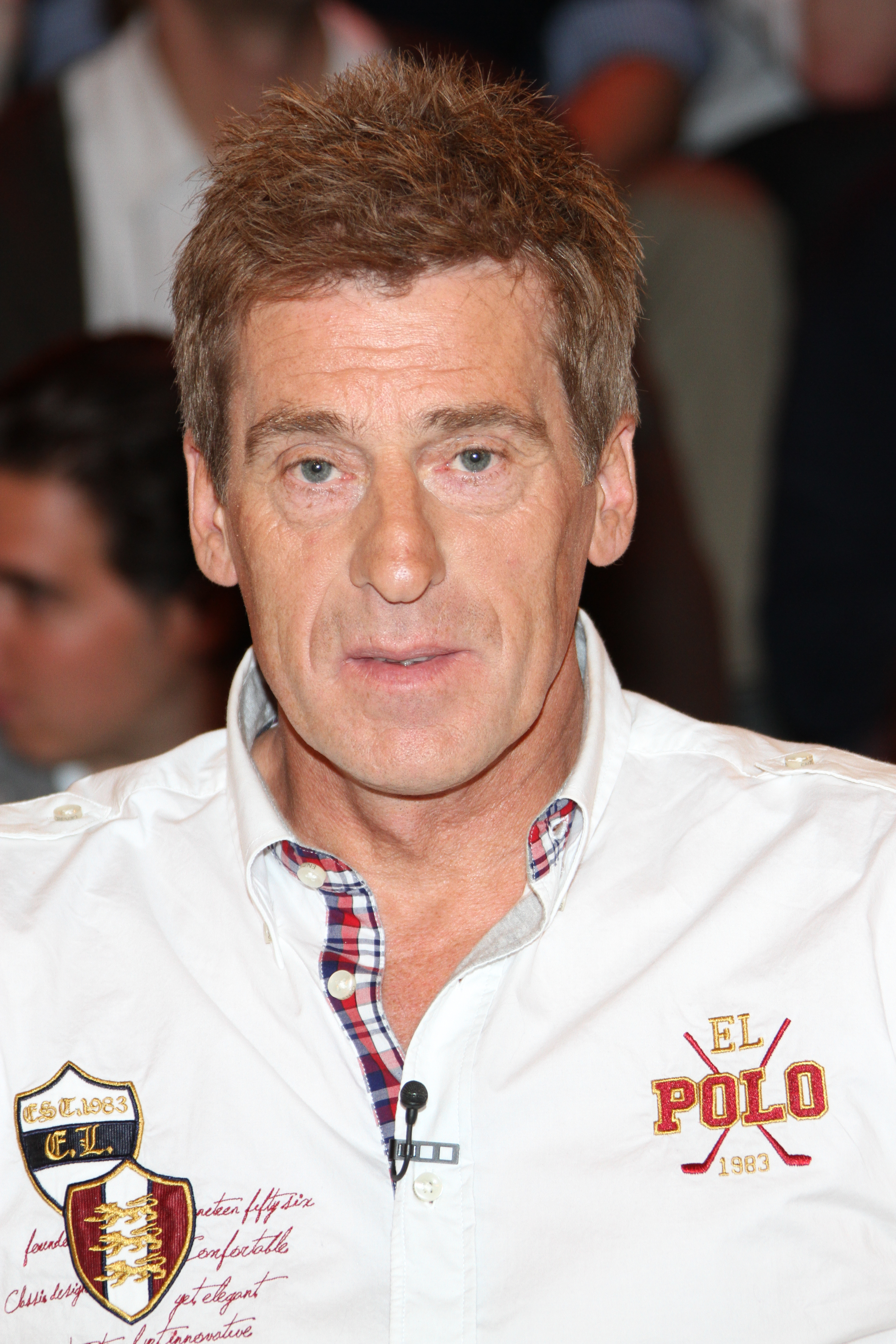 Ulrich „Uli“ Stein (* 23. Oktober 1954 in Hamburg) ist ein ehemaliger deutscher Fußballspieler und heutiger Torwarttrainer.